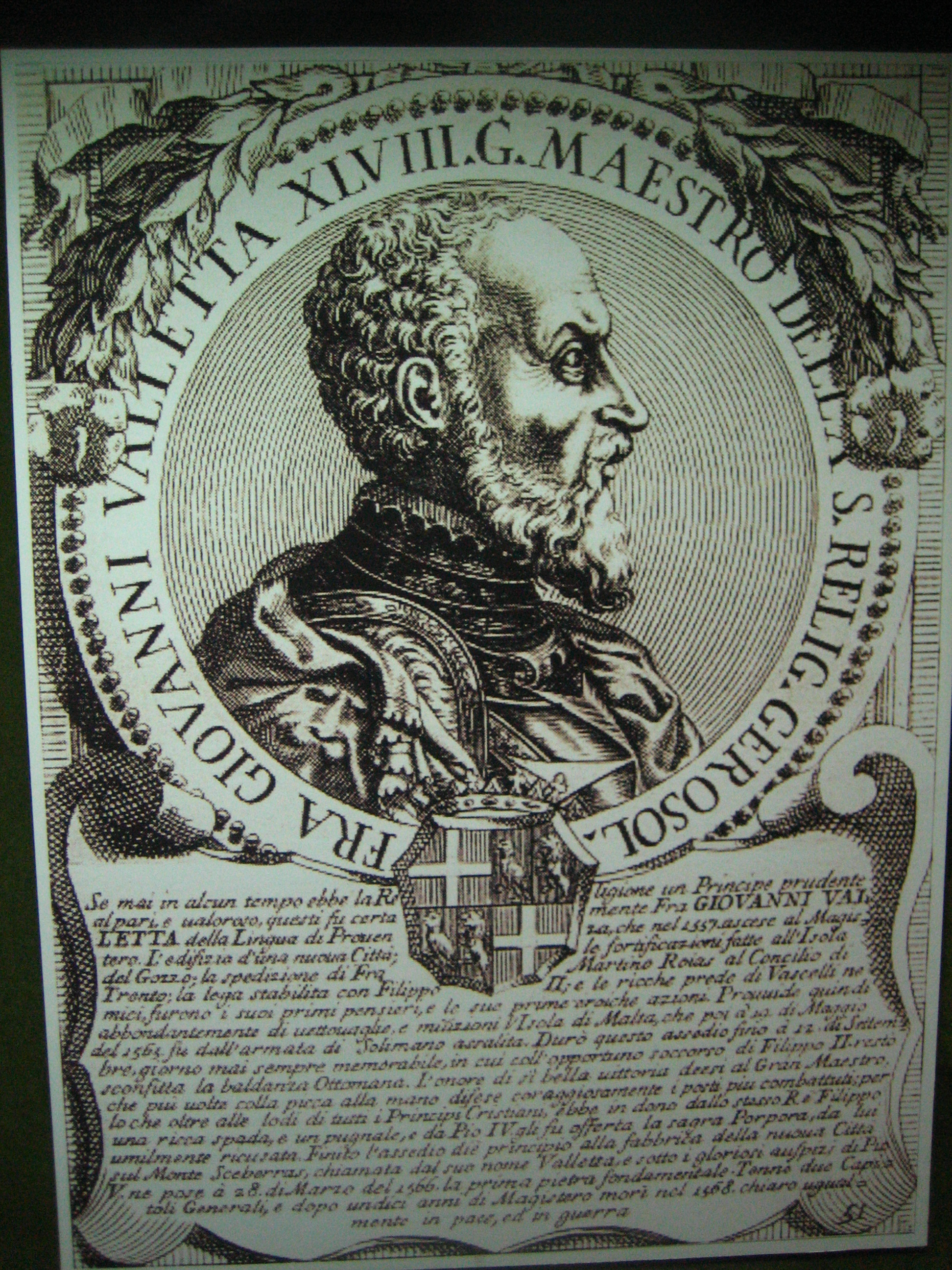 De Jean Parisot de La Valette, Panneau am Militärgeschichtleche Musée vu Valletta, Malta